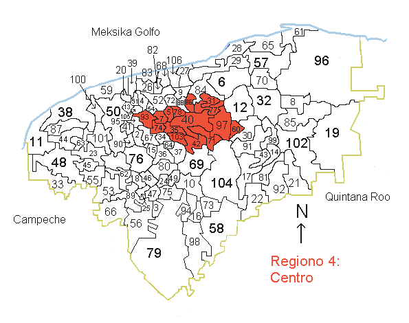 La bildo montras la situon de la regiono 4, Centro en Yucatán Kategorio:Geografio de Yucatán